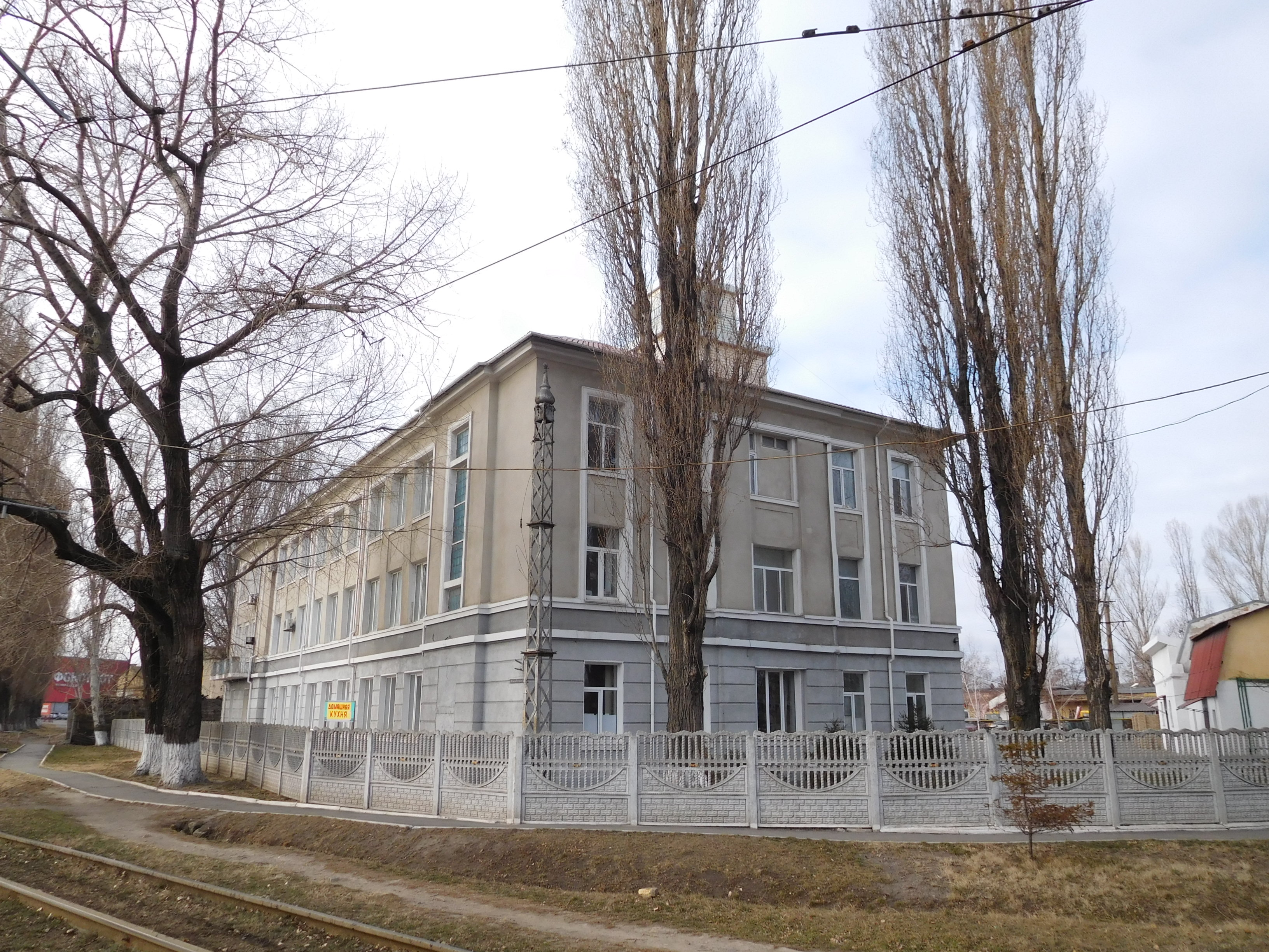 Адміністративна будівля за адресою вул. Чорноморського козацтва 165, зведена на місці Хрестовоздвиженської церкви. Одеса, Ярмаркова площа